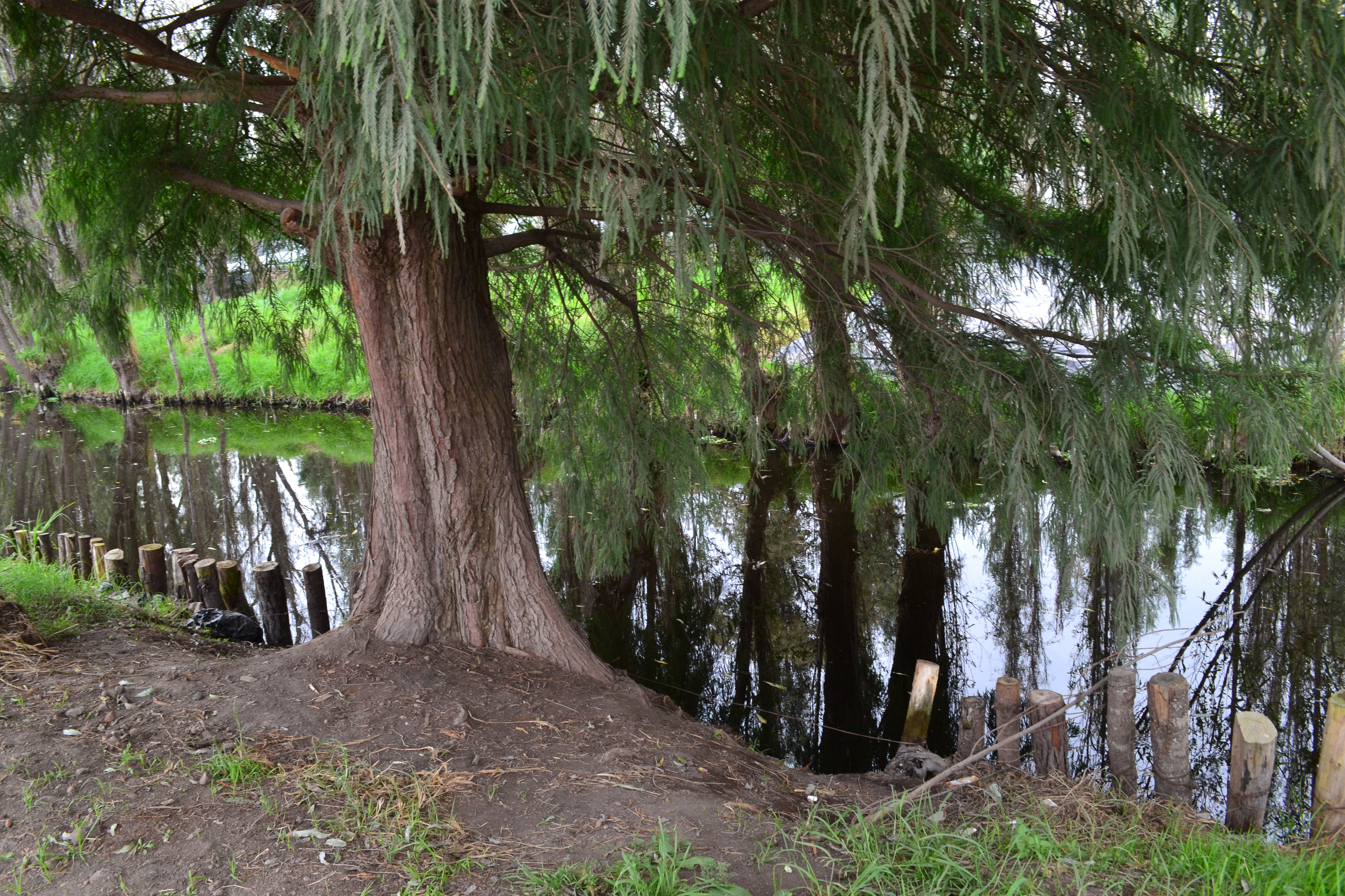 En la foto se muestra un árbol perteneciente a la familia de las coníferas, este gusta de crecer en sitios donde hay gran conservación de agua o mantos acuíferos ya que necesita mucha agua para poder desarrollarse y crecer a lo largo de su vida.